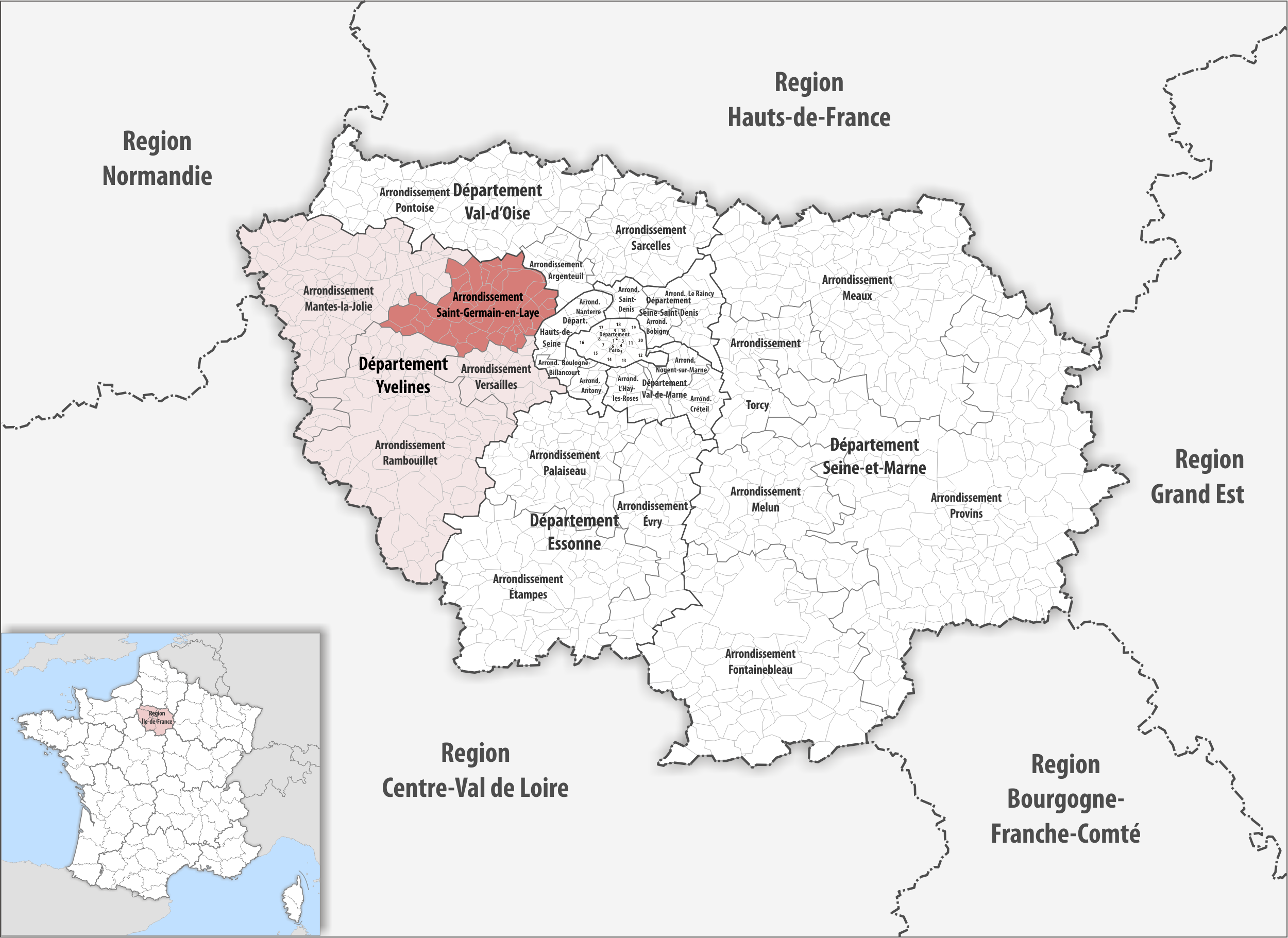 Lage des Arrondissements Saint-Germain-en-Laye